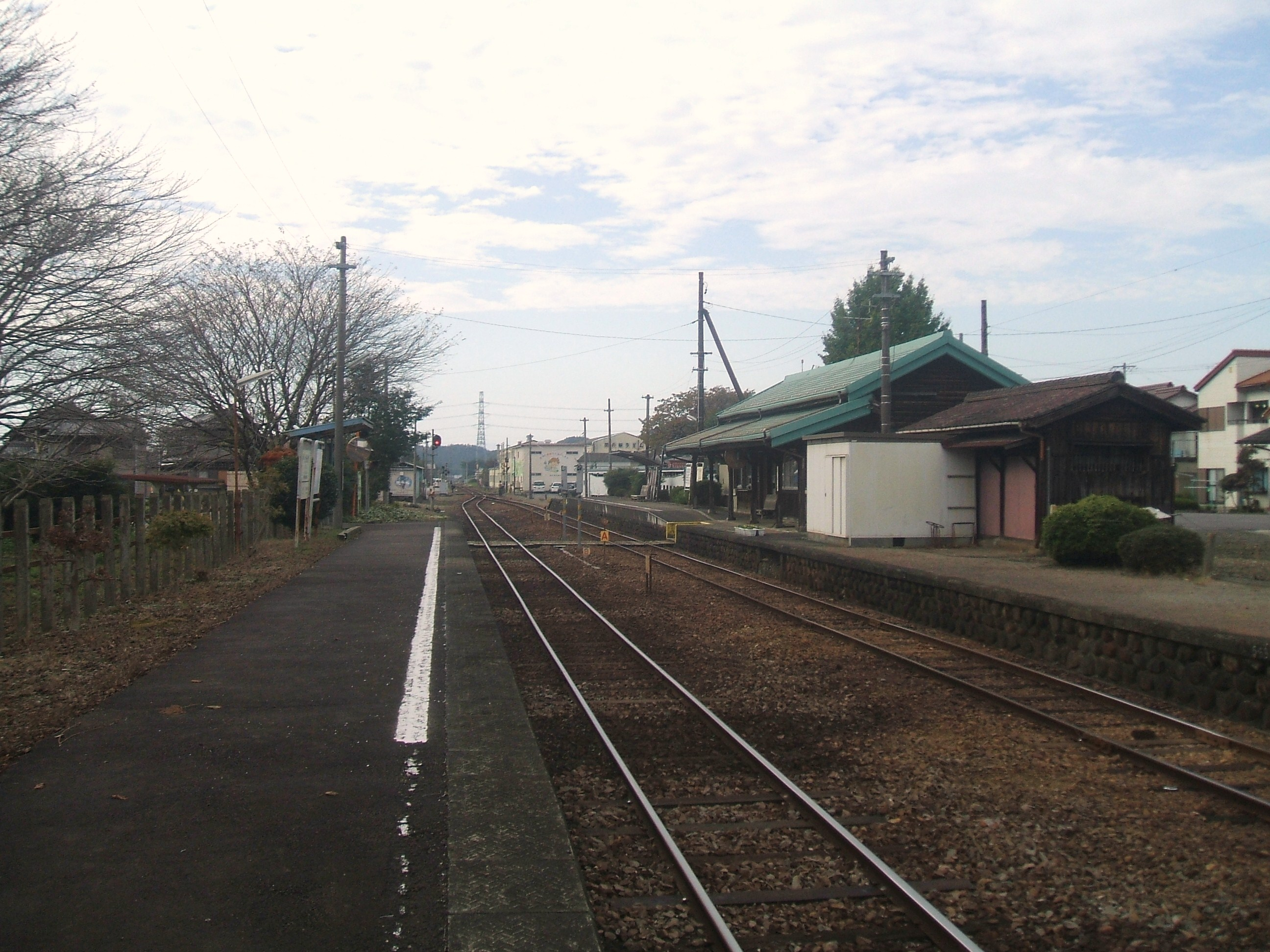 富加駅構内